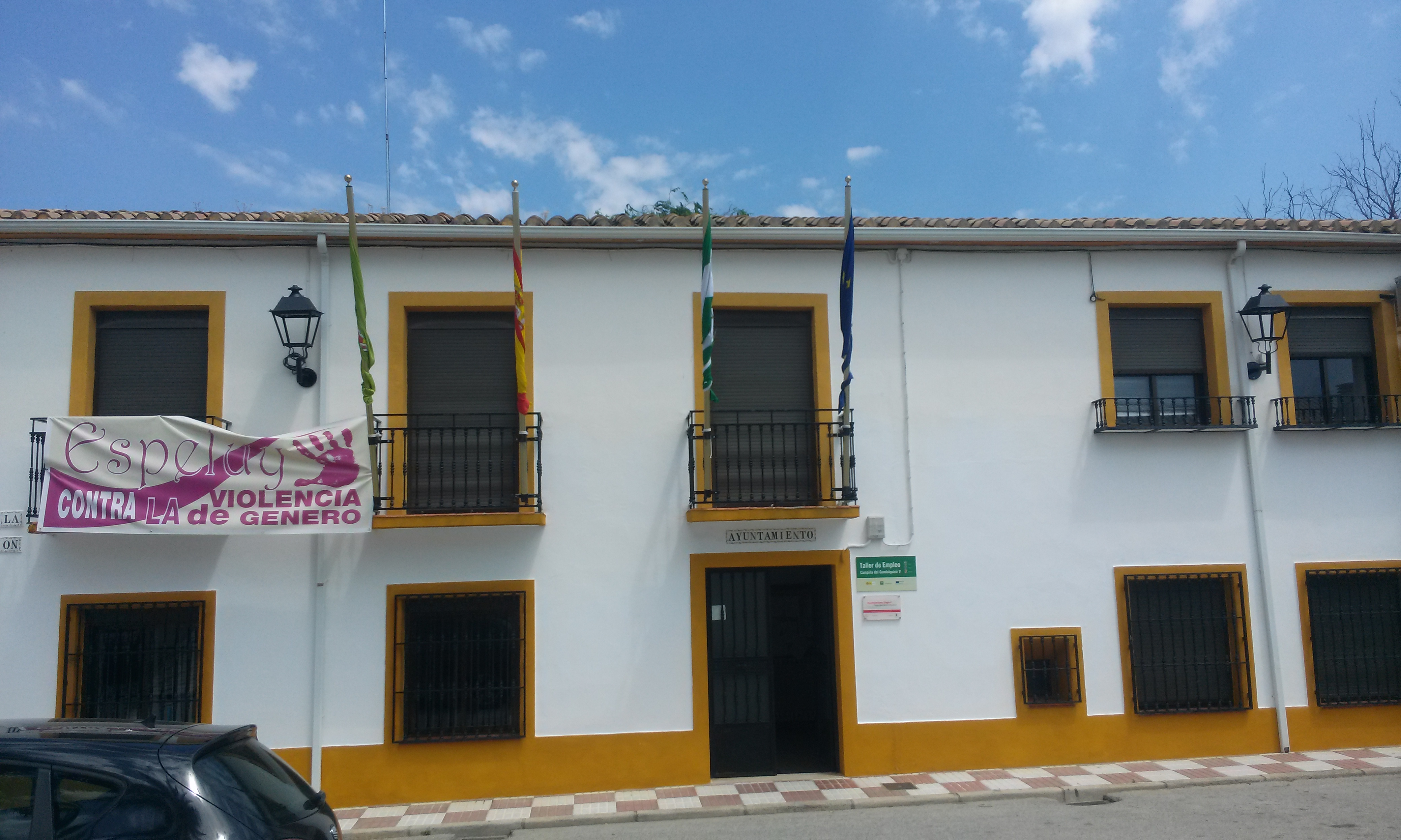 Ayuntamiento de Espelúy.